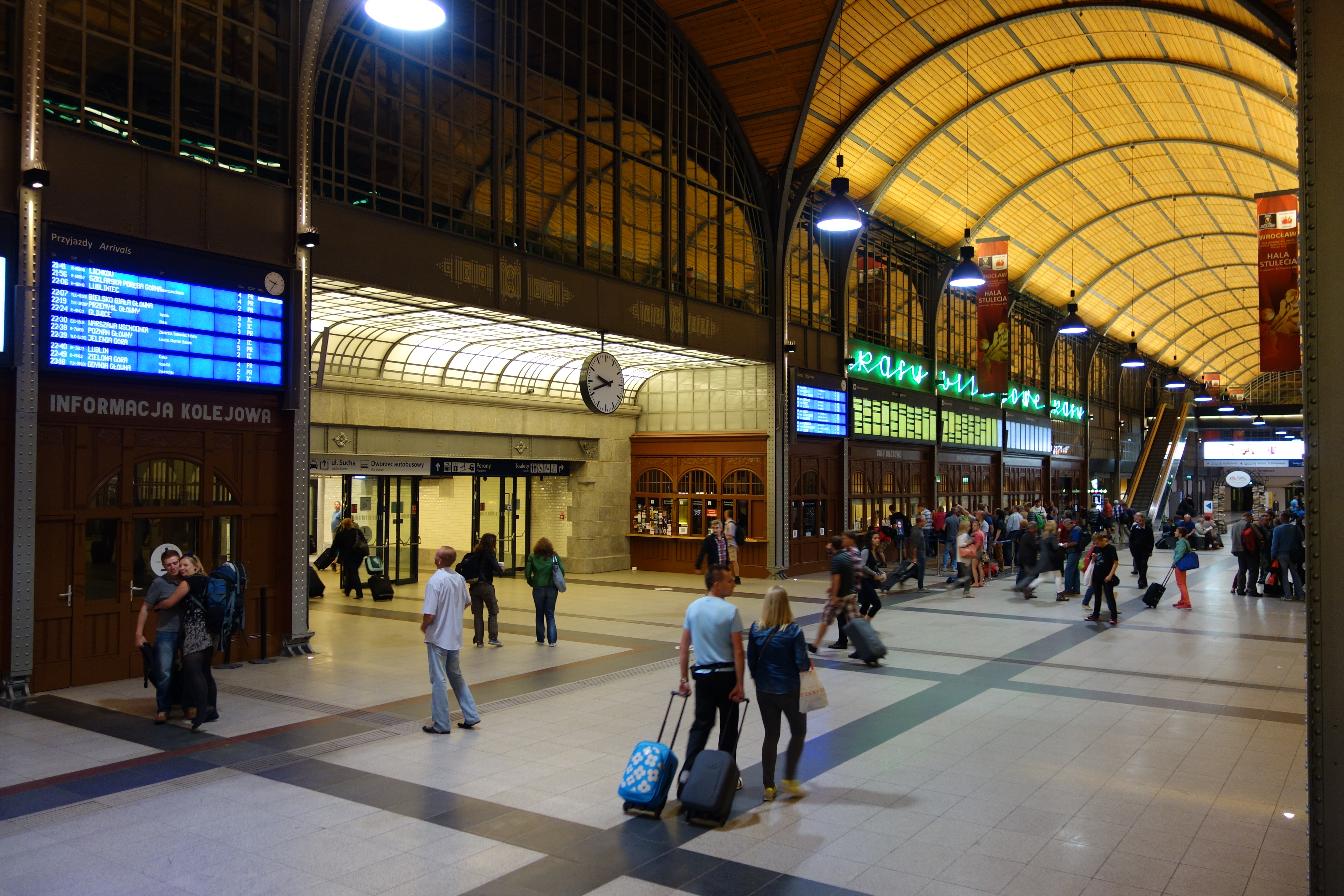 Wrocław Główny - hol kasowy , You can see all photographs in category Wikiekspedycja kolejowa 2014.